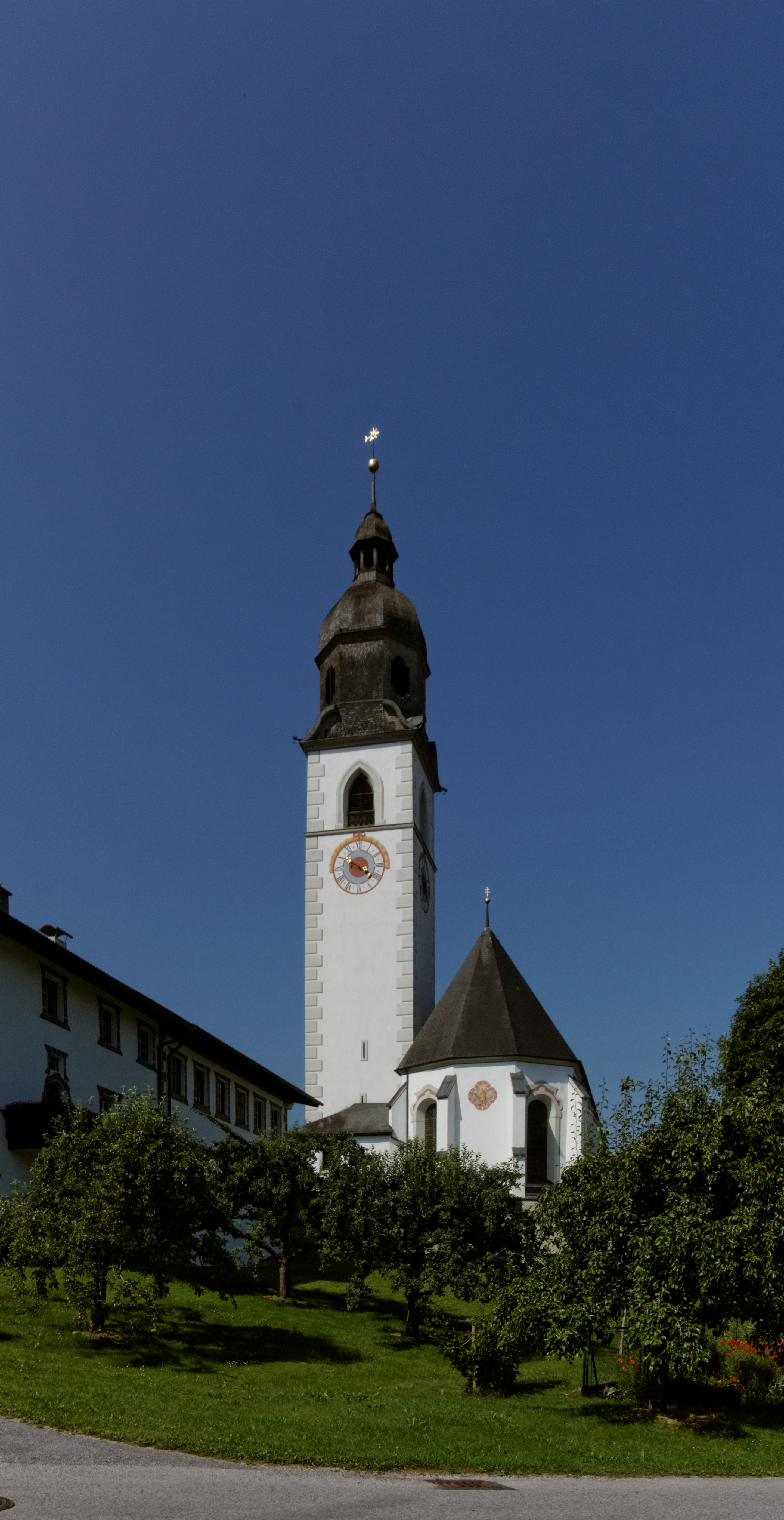 Pfarrkirche St. Johannes der Täufer; Stams, Tirol, Austria